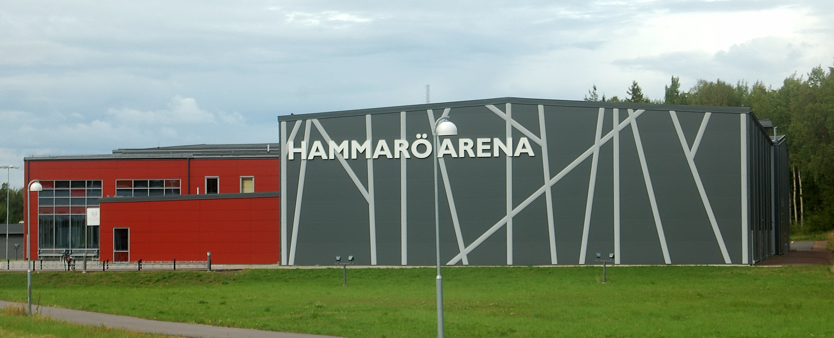 Hammarö Arena